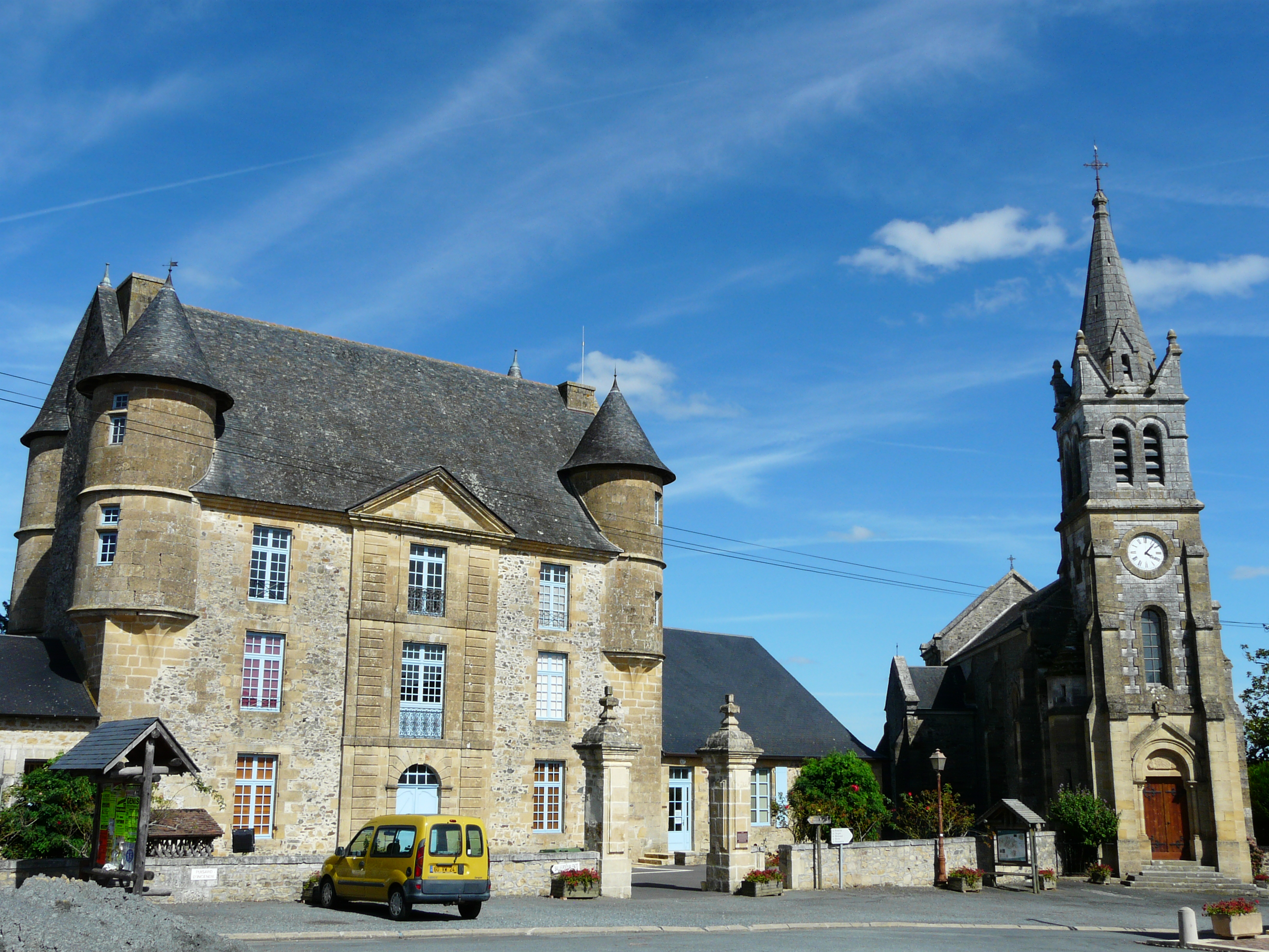 Le château et l'église Saint-Pierre-ès-Liens de Dussac, Dordogne, France.